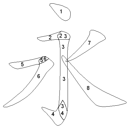 Das Schriftzeichen Yong Beschreibung: Die acht Prinzipien der chinesischen Kalligrafie an Hand des Schriftzeichens Yong 永 Quelle: englische Wikipedia 13:01, 25. Nov 2004 Immanuel Giel 424 x 426 (8568 Byte) (Das Schriftzeichen Yong)